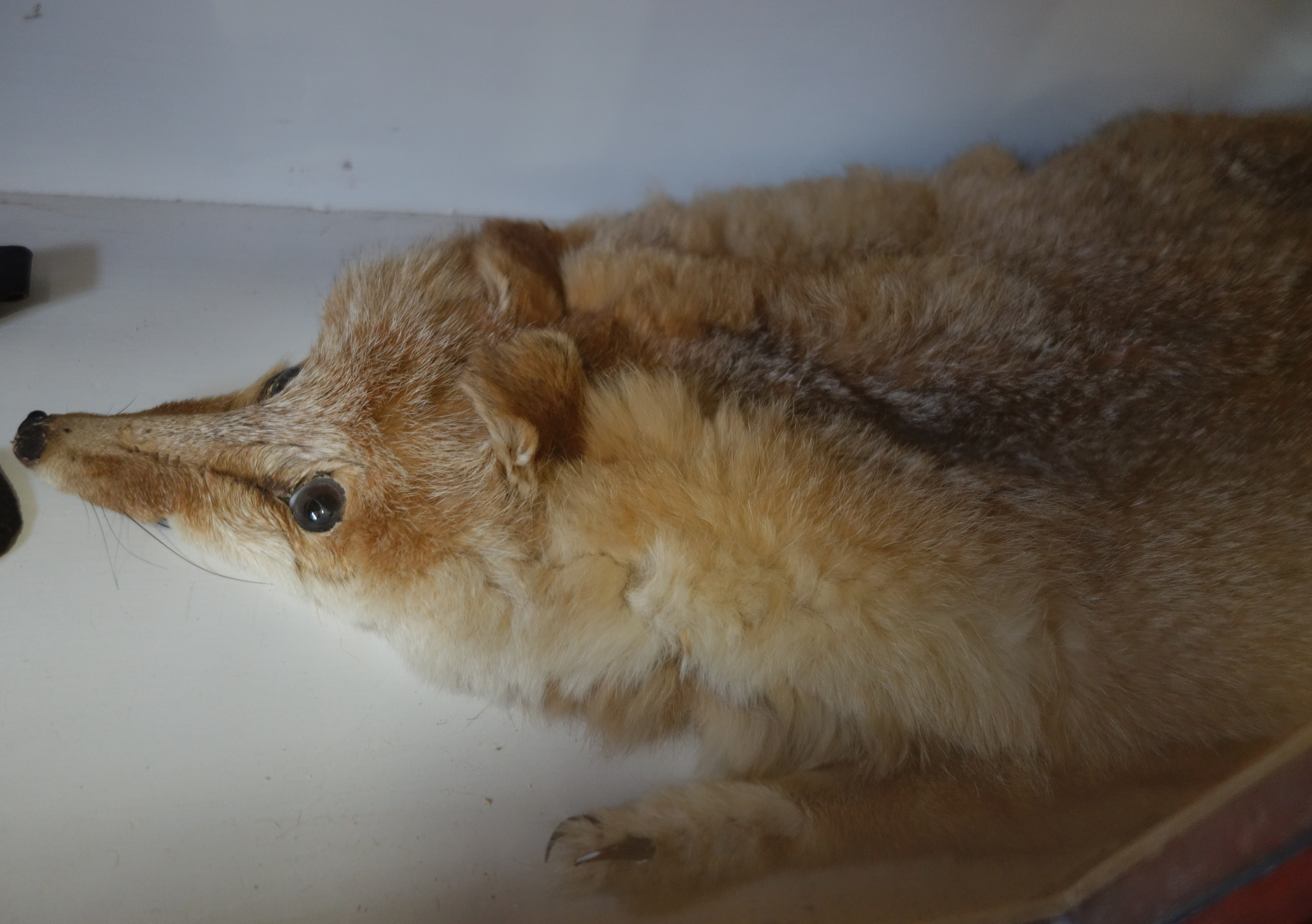 Swakopmund Museum, Kollier aus Kapfuchsfell.